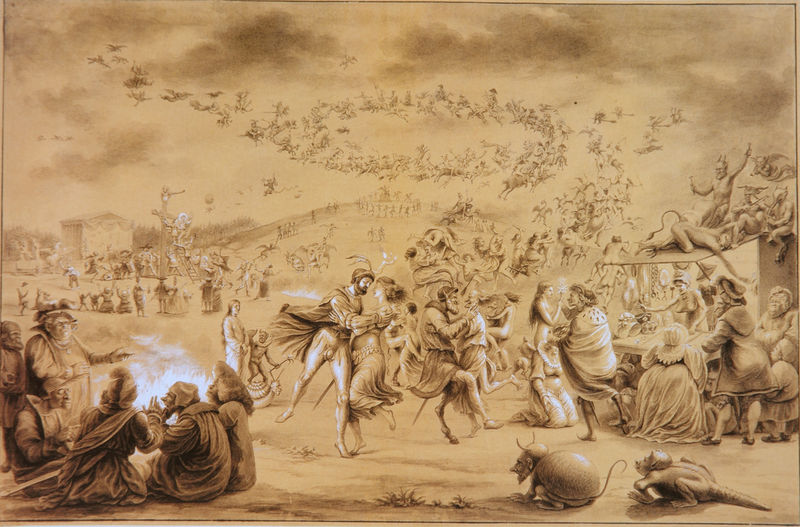 Walpurgisnacht – Faust und Mephisto auf dem Blocksbergtitle QS:P1476,de:"Walpurgisnacht – Faust und Mephisto auf dem Blocksberg" label QS:Lde,"Walpurgisnacht – Faust und Mephisto auf dem Blocksberg"